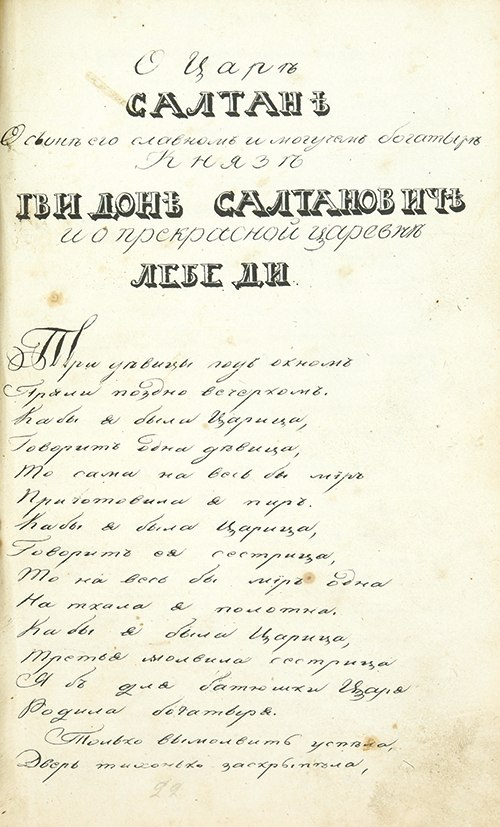 [Рукопись] Образцы стихотворной словесности. Творения знаменитых русских поэтов: Жуковского, Пушкина, Козлова, Дмитриева, Розена и других / [сост.] трудами священника Александра Протопопова. 1834. 665 с.: ил. 20 х 12 см. Во владельческом марокеновом переплете эпохи. Тиснение по крышкам и корешку. Форзацы выполнены из бумаги "под мрамор". Дублюра. Надрывы корешка. Загрязнение страниц от перелистывания, надрывы корешка. В рукопись вошли произведения: "Полтава" и ""О царе Салтане..." А.С. Пушкина, "Шильонский узник" В.А. Жуковского, "Четыре времени года" Ф.Н. Слепушкина, "Невеста Абидосская" И. Козлова, "Бал" Е. Баратынского, "Безумная" И. Козлова, "Киргизский пленник" Н. Муравьева, а также произведения Н. Карамзина, К. Батюшкова и других. Вся книга написана от руки каллиграфическим почерком с заглавным листом, исполненным тушью и с многочисленными виньетками, нарисованными от руки или вырезанными из гравированных картин. В состав рукописи также входят "оглавление" и "примечания" - пояснение некоторых слов и выражений. Все страницы пронумерованы. Рукопись представляет историко-культурную ценность музейного уровня.